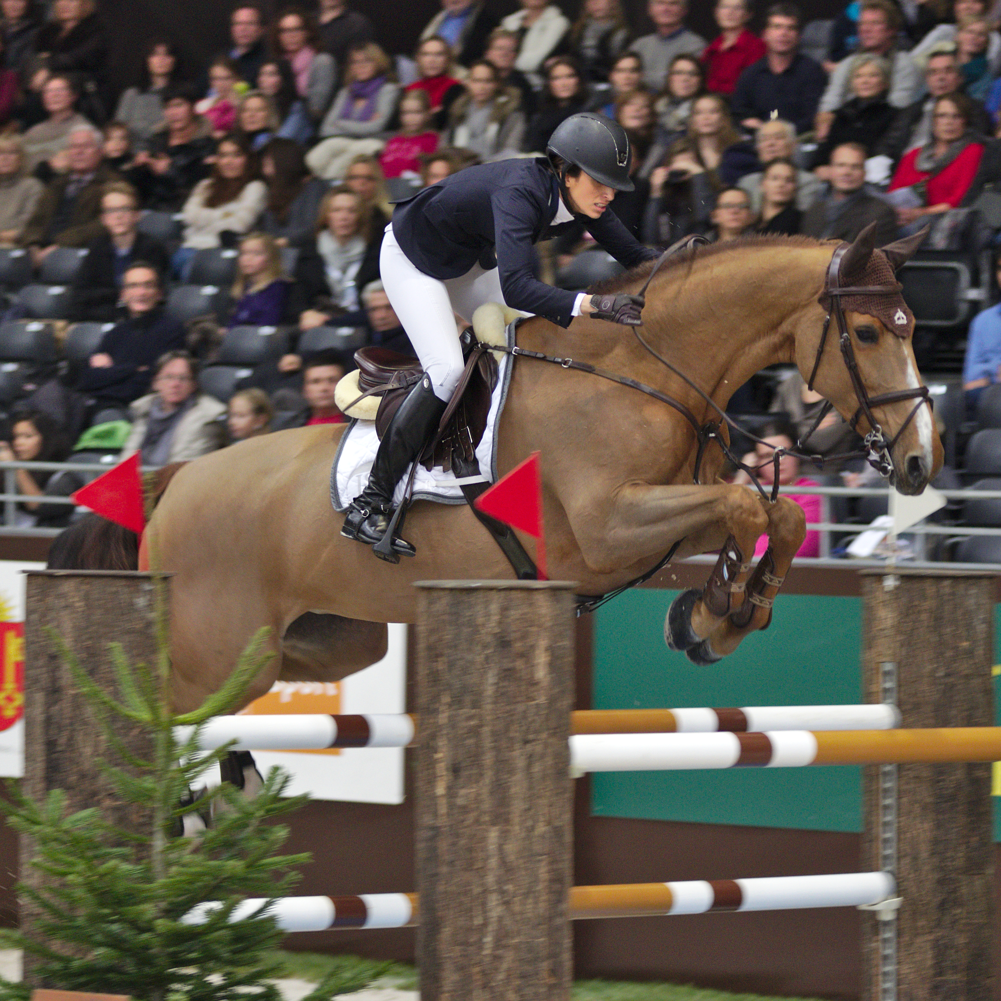 CHI Genève 2013 - 20131213 - Janika Sprunger et Electra Van't Roosaker